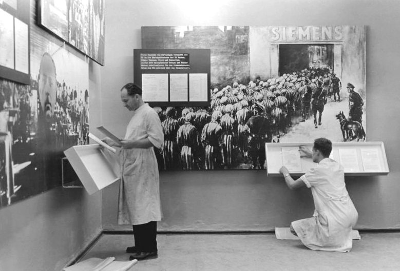 Mahn- und Gedenkstätte Ravensbrück, Zelle Zentralbild Zühlsdorf 12.8.1959 Mahn- und Gedenkstätte Buchenwald vor der Vollendung. Die Bauarbeiten an der Mahn- und Gedenkstätte Ravensbrück, die auf dem Gelände des ehemaligen Frauenkonzentrationslagers zur Erinnerung an die 92.000 von der SS ermordeten Frauen und Kinder entsteht, stehen vor dem Abschluß. Am 12. September, dem Tag der Opfer des Faschismus, wird die auf Beschluß der Tausende von Frauen aus dem Bezirken Potsdam und Neubrandenburg sowie Frauendelegationen aus zahlreichen europäischen Staaten werden zu den Einweihungsfeierlichkeiten erwartet. UBz: Eine ehemalige Zelle im Arrestgebäude, das zu einem würdigen Museum umgebaut wird. [Mahn- und Gedenkstätte für das Konzentrationslager Ravensbrück, Zellenbau im Arrestgebäude, Ausstellungsraum mit Fotos]